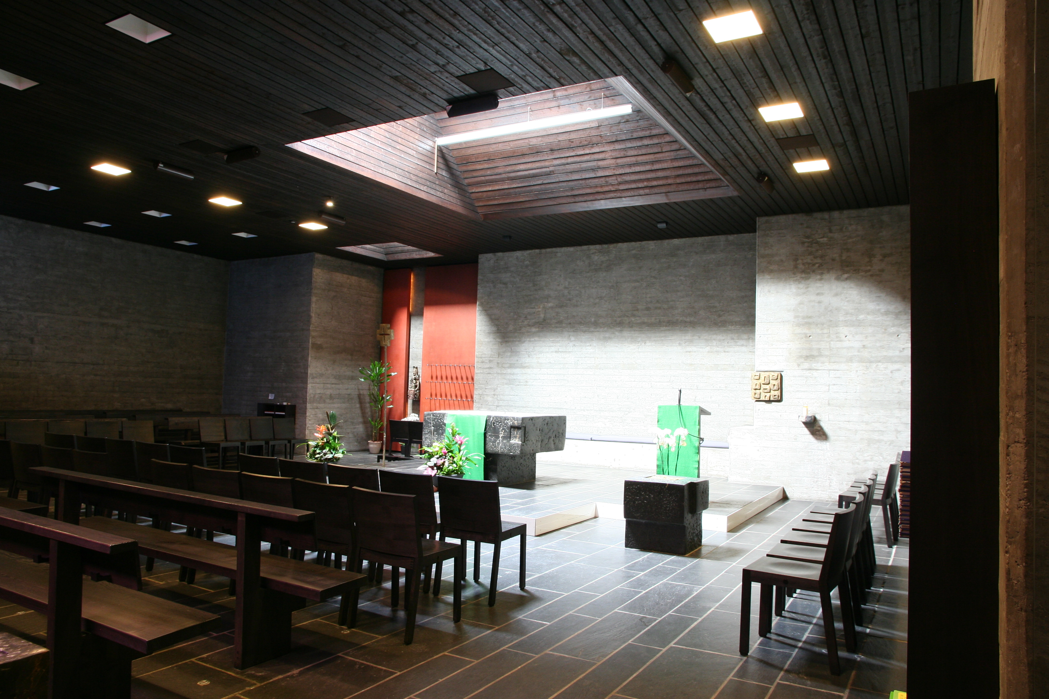 Römisch-katholische Pfarrkirche Christ König Biel/Bienne